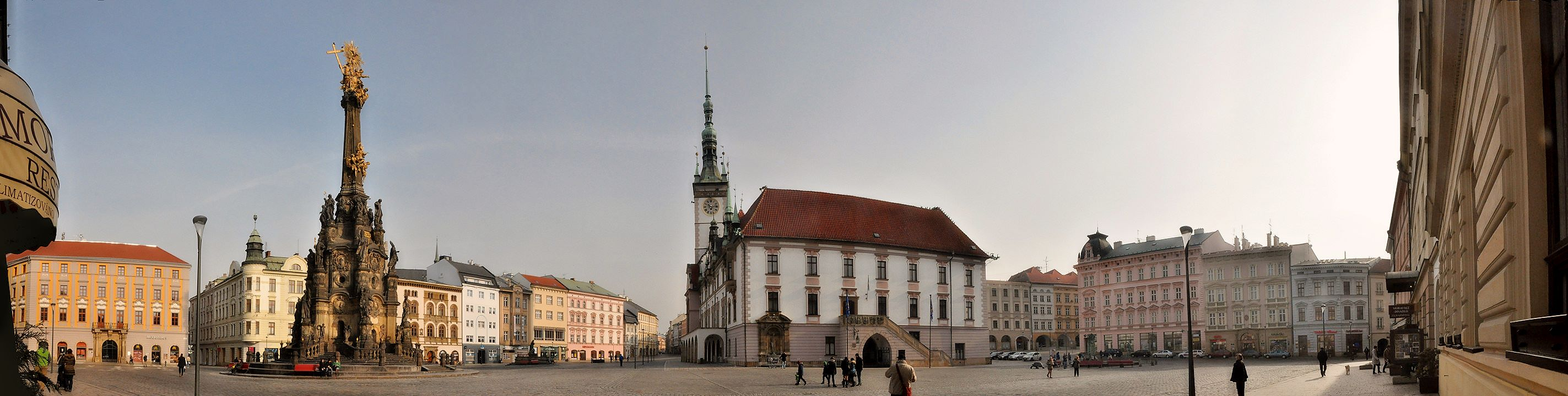 Olmuetz, Oberring mit Dreifaltigkeitssaeule, Rathaus und Brunnen